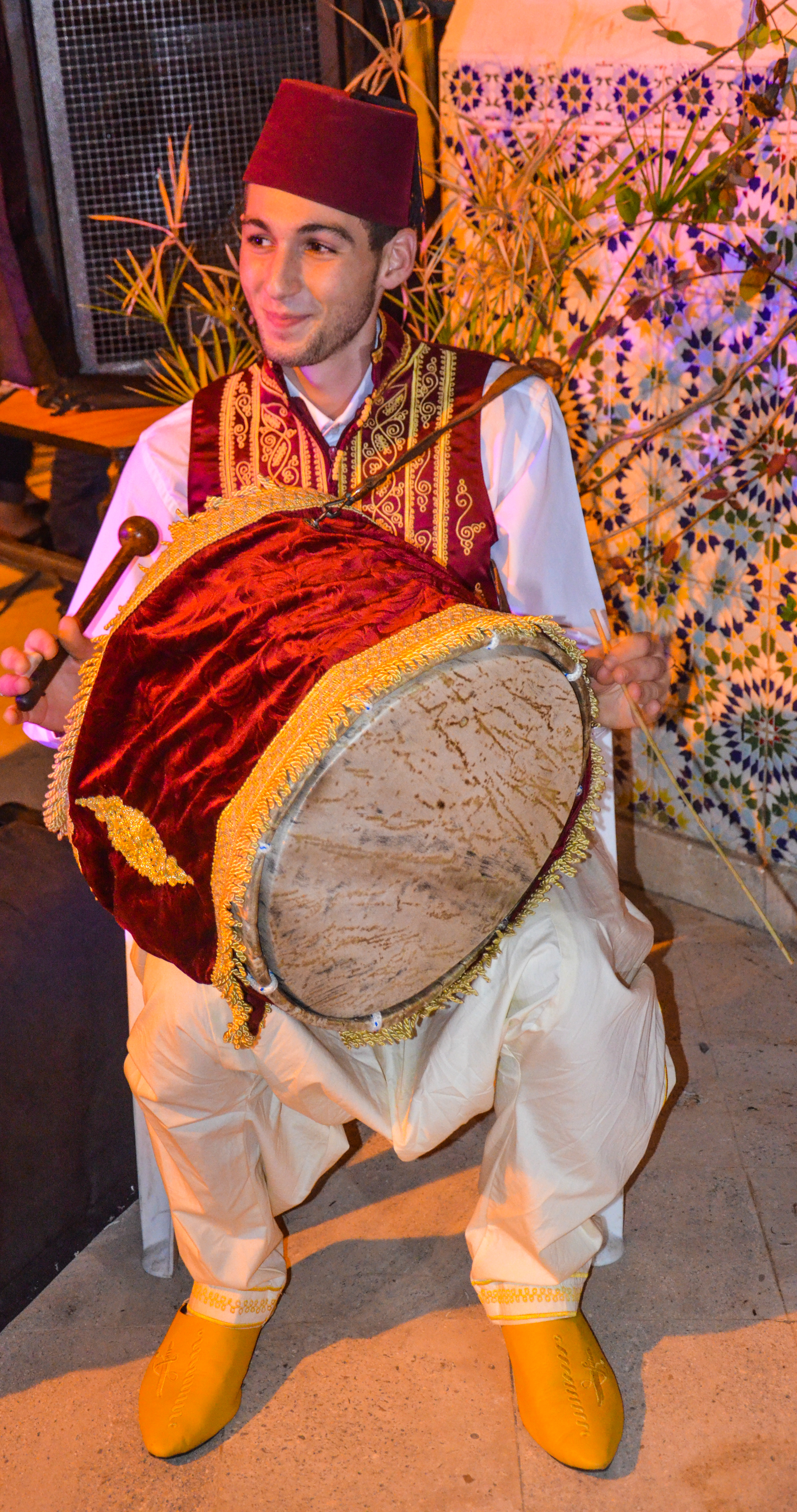 ZORNA d'Alger This is an image of music and dance from Algeria